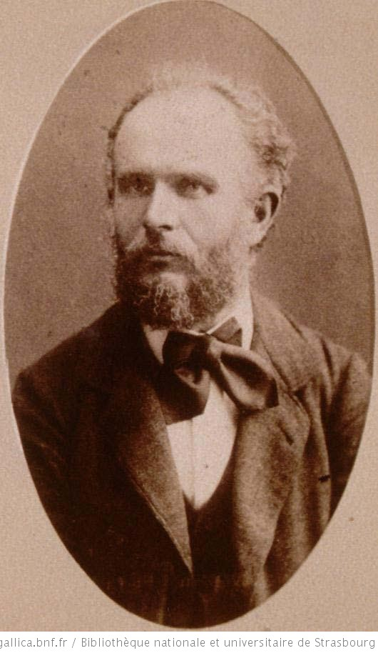 Appartient à l’ensemble documentaire : BNUStr003